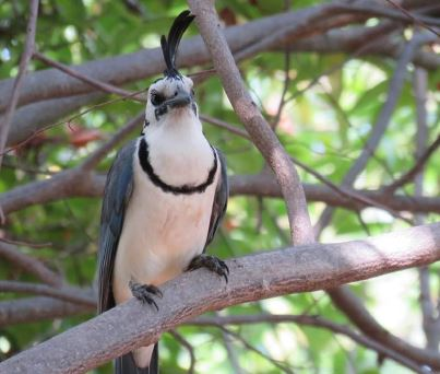 Calocitta formosa, comun en la isla